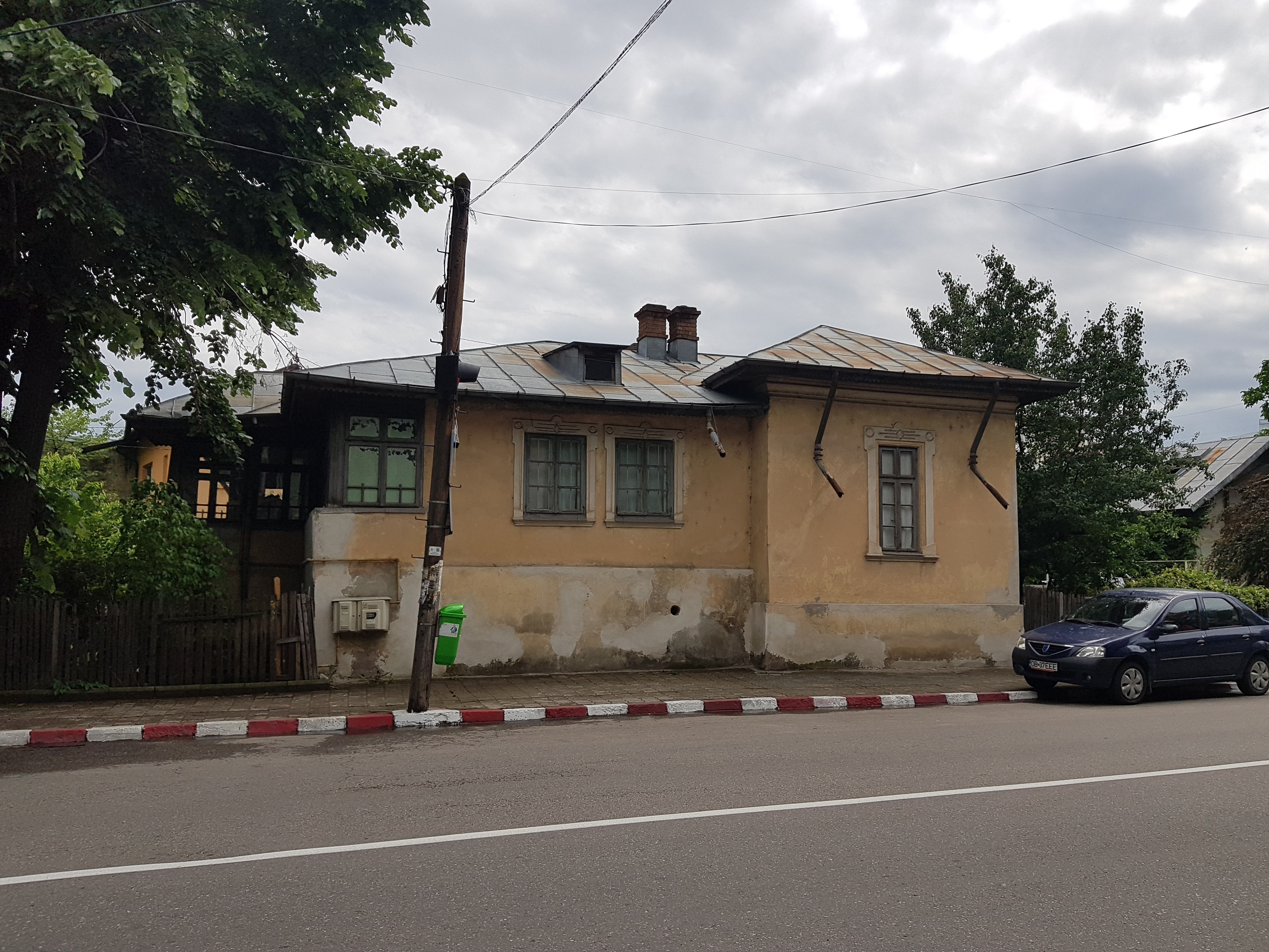 Casa Virgil Tomescu, Virgil Fucșineanu